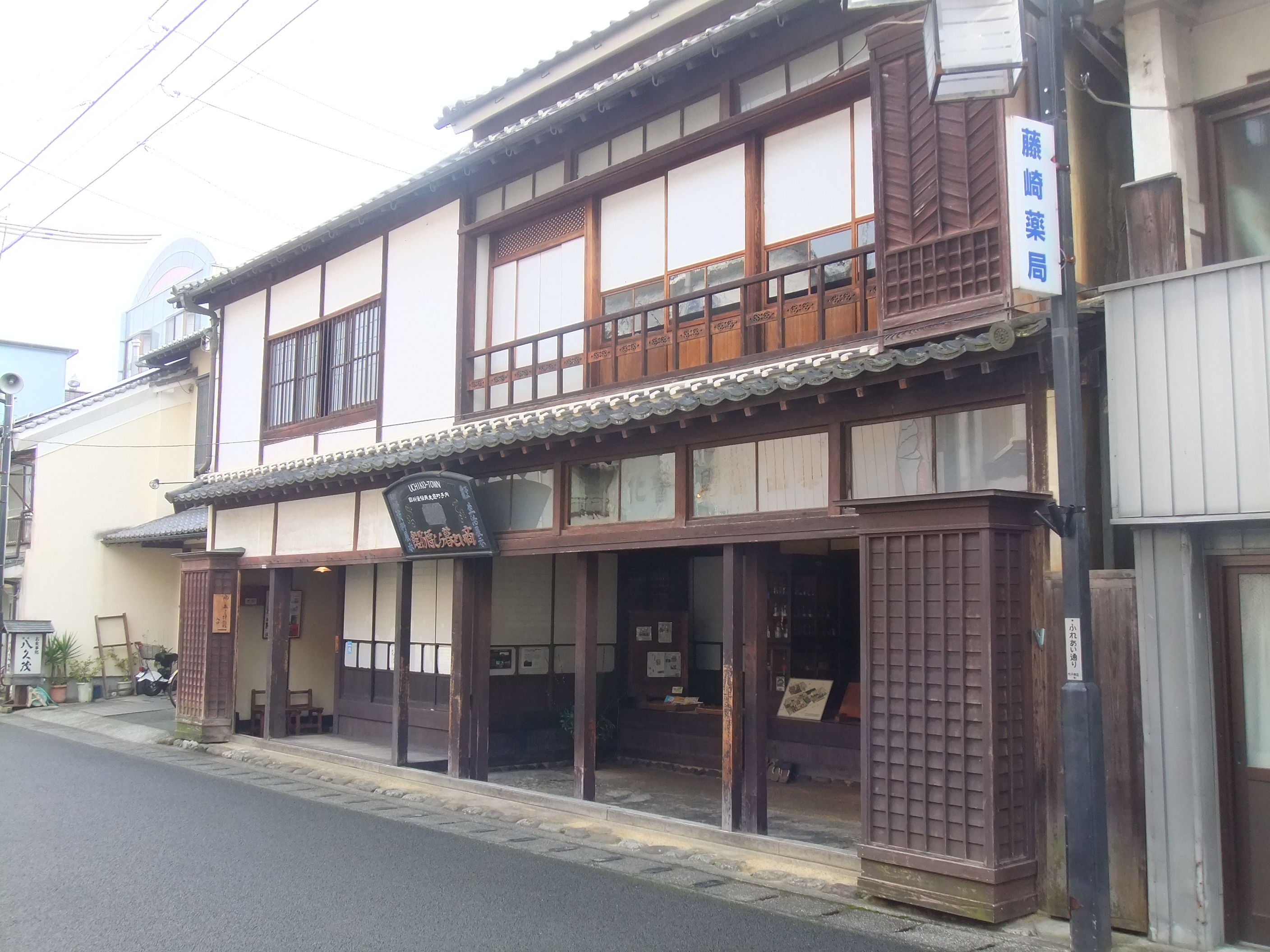 商いと暮らし博物館